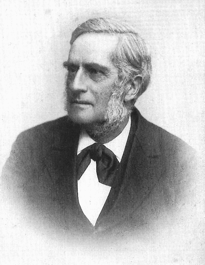 Heinrich Weber, Ehemann von Mathilde Weber